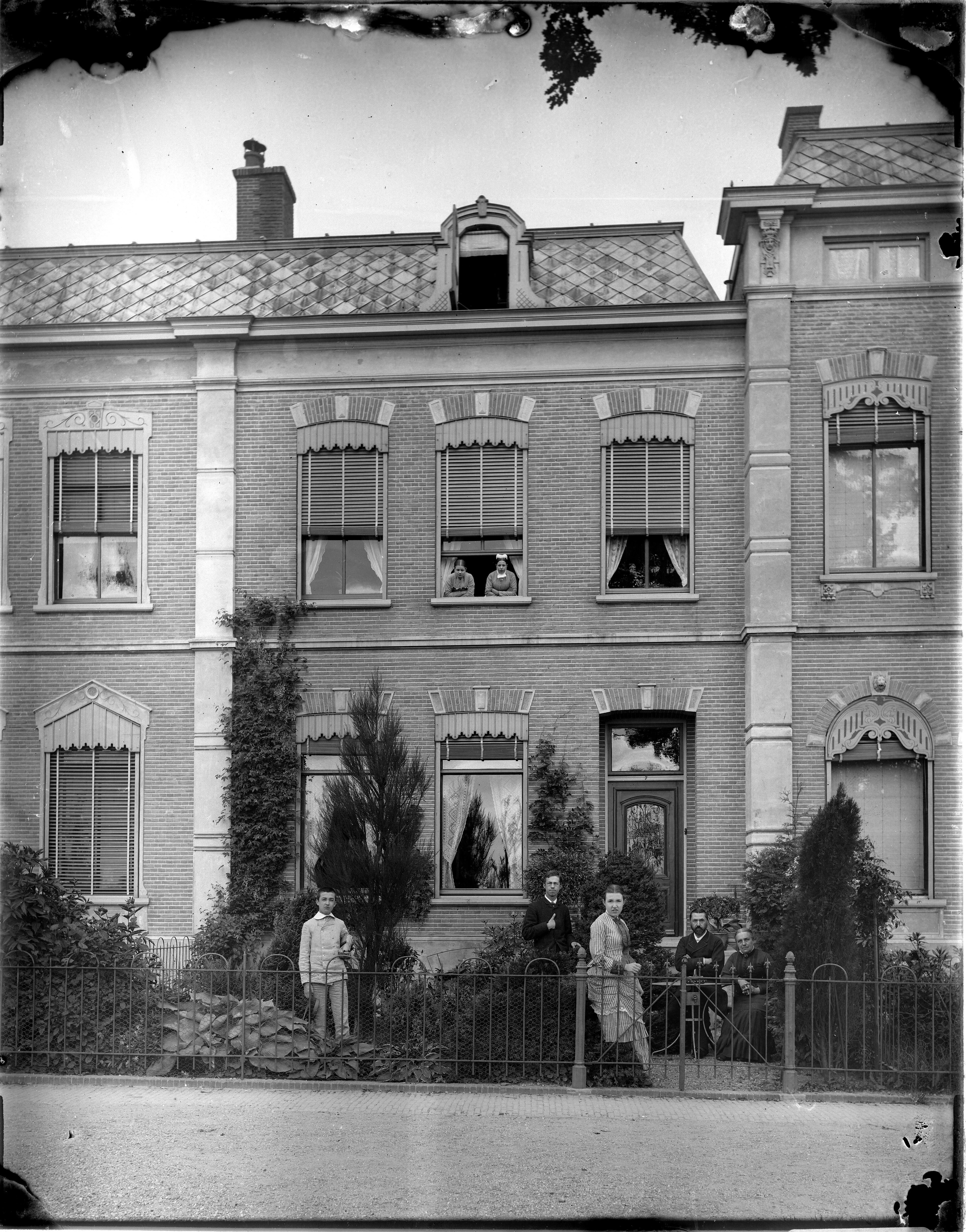 Het pand Plantage 7 met zijn bewoners.